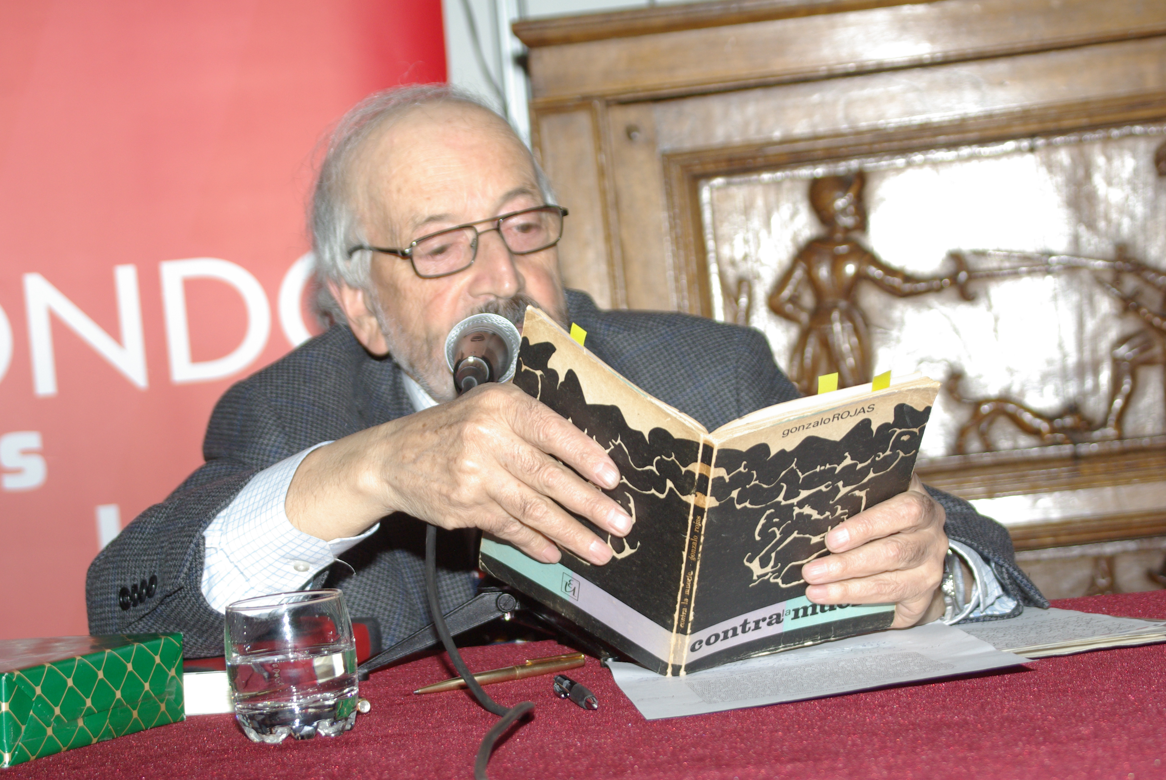 El poeta chileno Floridor Pérez en una velada de homenaje a Gonzalo Rojas celebrada en el Museo Histórico Nacional en el marco de la Fiesta del Libro de la Plaza de Armas de Santiago, abril 2013